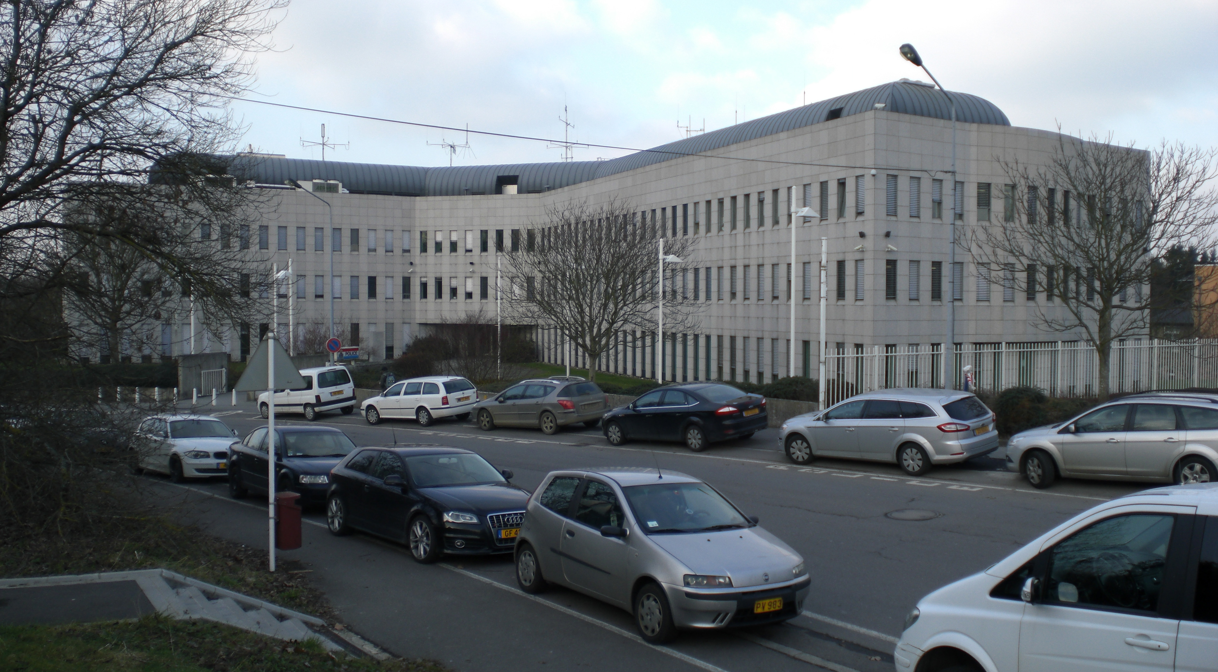 Polizeizentrale Luxemburg, Verwaltungsgebäude auf Verlorenkost vor der Erweiterung (2012-2014)